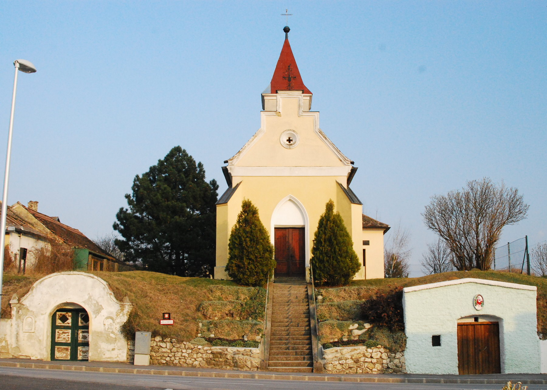 Ortskapelle heilige Mutter Gottes